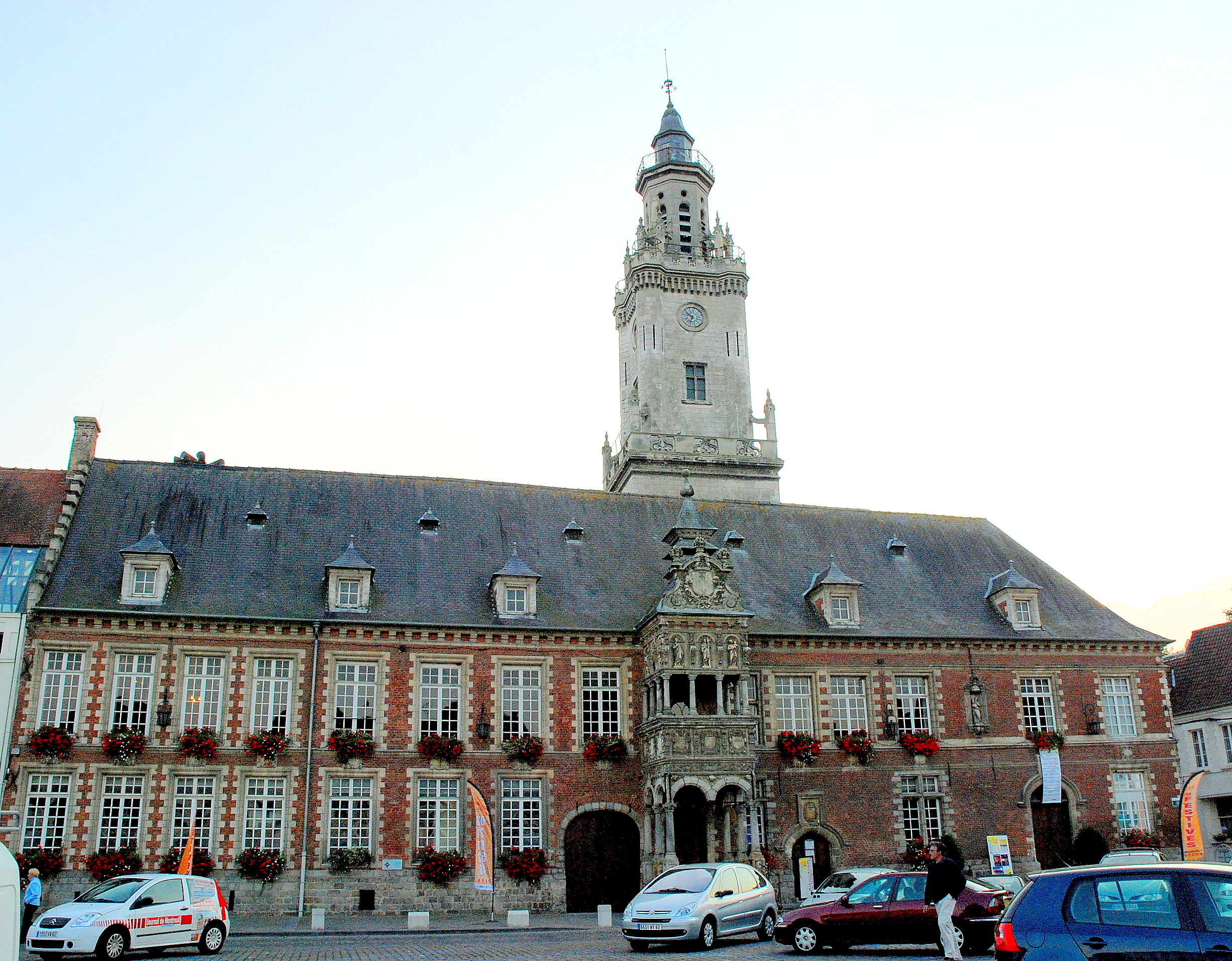 palais de Marie d'Hongrie, maintenant hôtel de ville à Hesdin